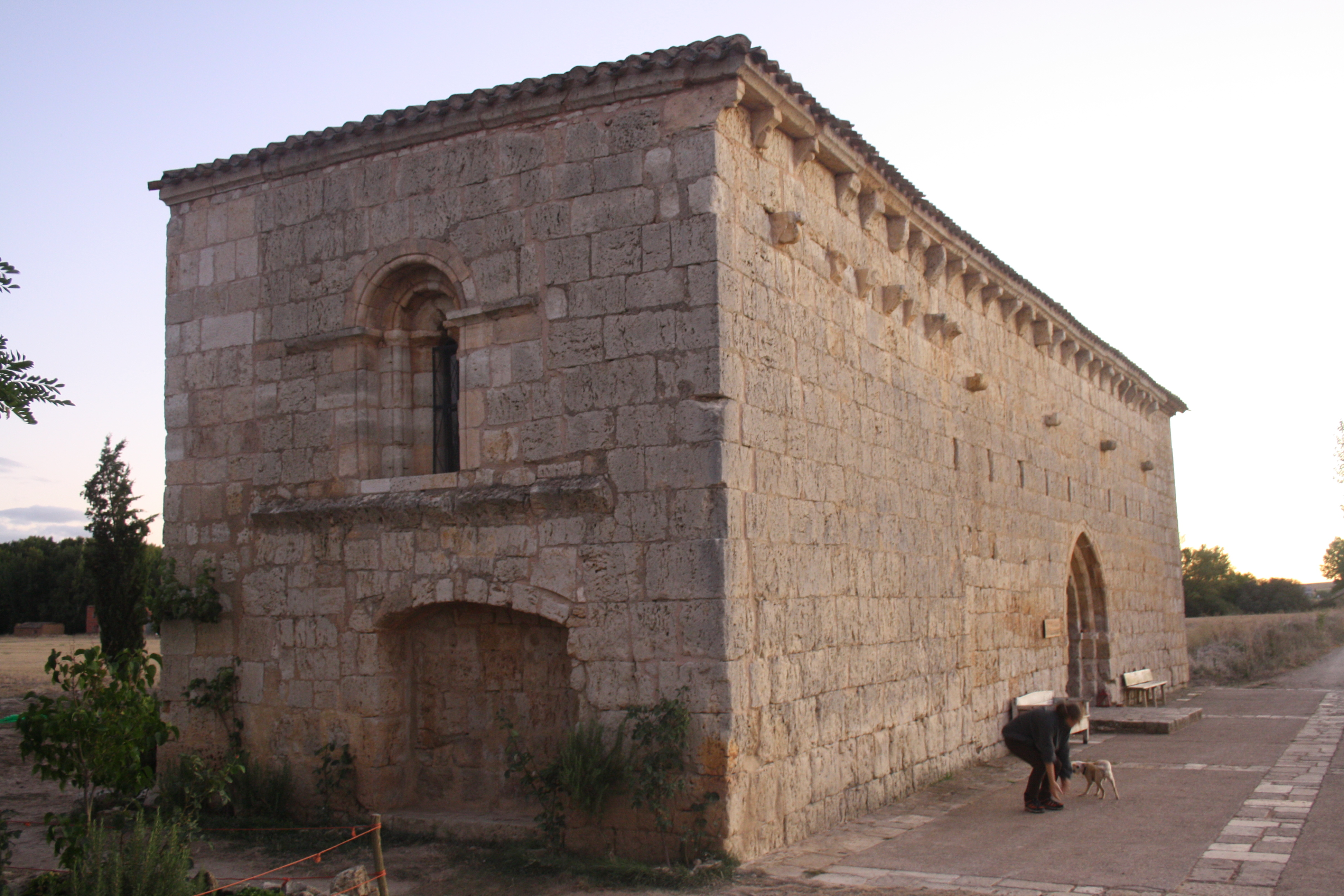 Ermita lungo il Camino de Santiago Itero del Castillo, vicino il Ponte Fitero sul Rio Pisuerga. Hospital gestito dalla Confraternita di San Iacopo di Compostella, Perugia, Italia